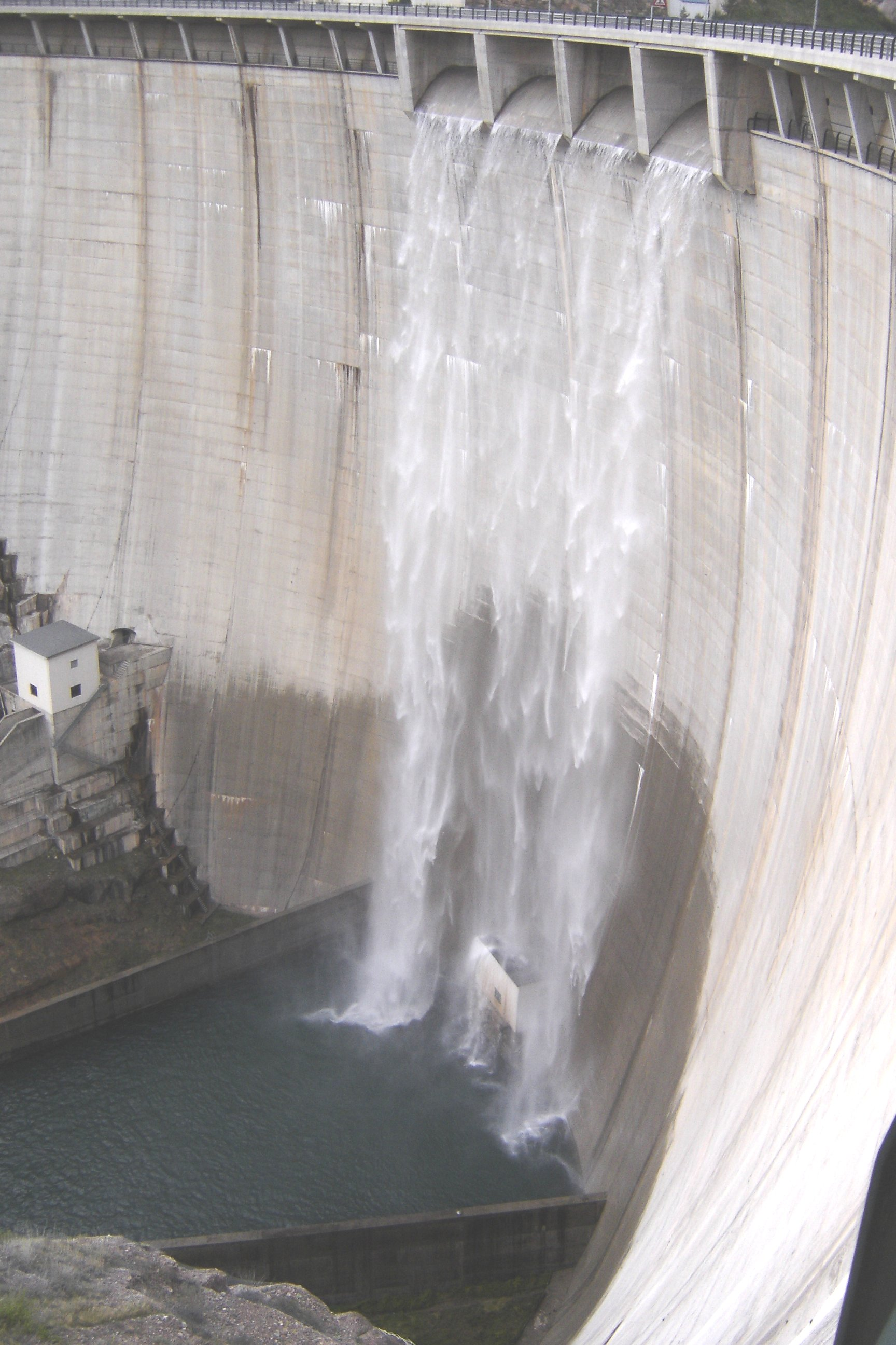 La presa de la Llosa del Cavall, a Navès (Solsonès)